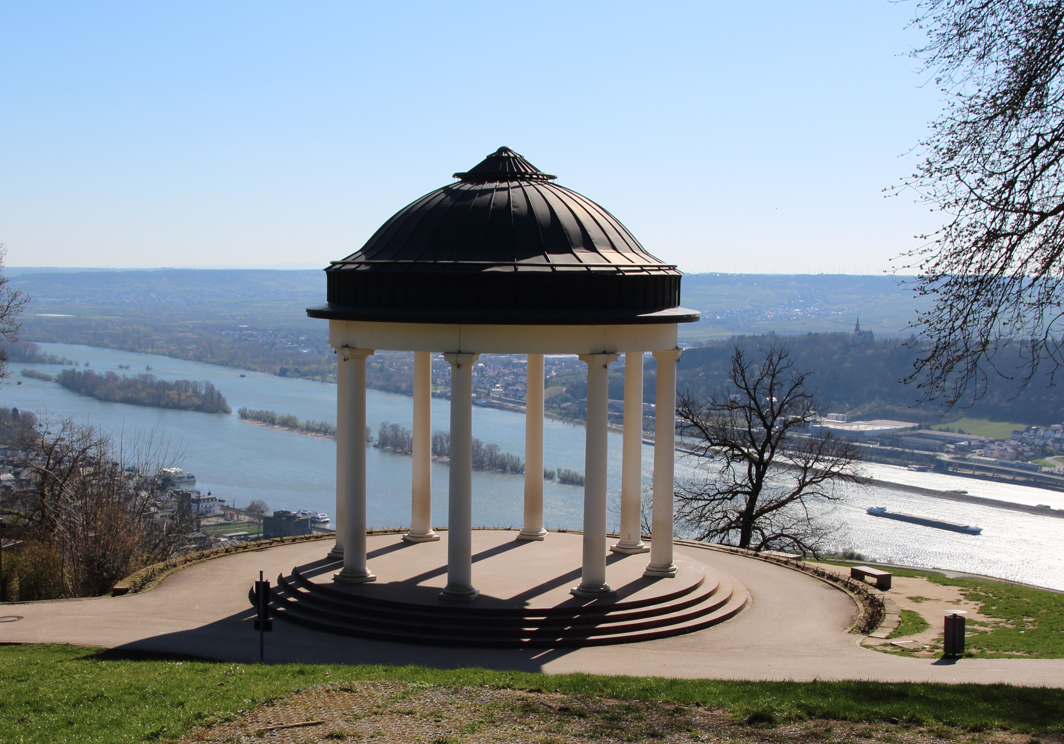 Aussichtstempel im Landschaftspark Niederwald in der Nähe des Niederwalddenkmals. Nachbau von 2006 des im Zweiten Weltkrieg im November 1944 zerstörten Originals von 1788. Rüdesheim am Rhein